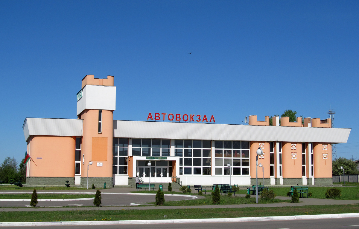 Чэрвень. Аўтавакзал